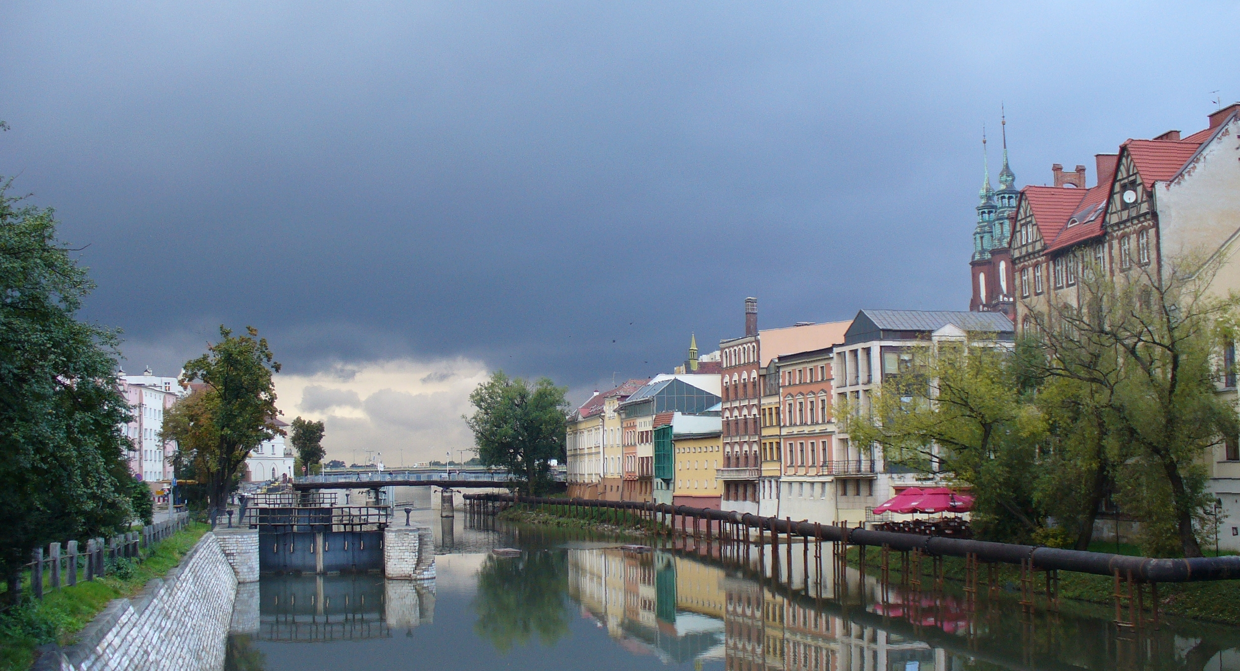 Oppeln Mühlgraben - Opole - Młynówka